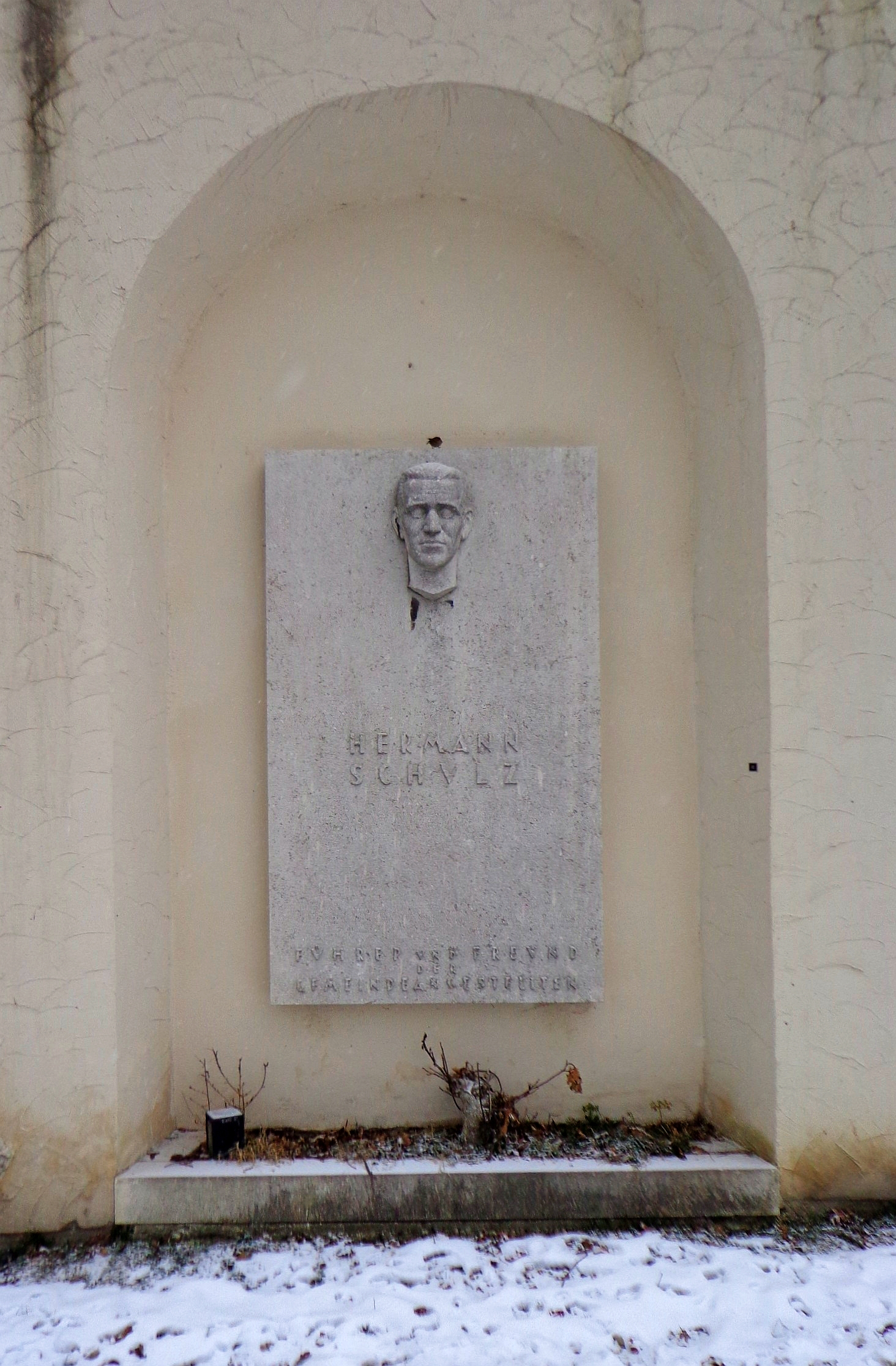 Feuerhalle Simmering, Urnengrab des Politikers Hermann Schulz (1874–1926). Lage des Grabes: Abteilung MR, Gruppe 92, Nummer 1G.